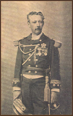 Fotografía Histórica de Ángel Ortiz Monasterio en la Armada de México